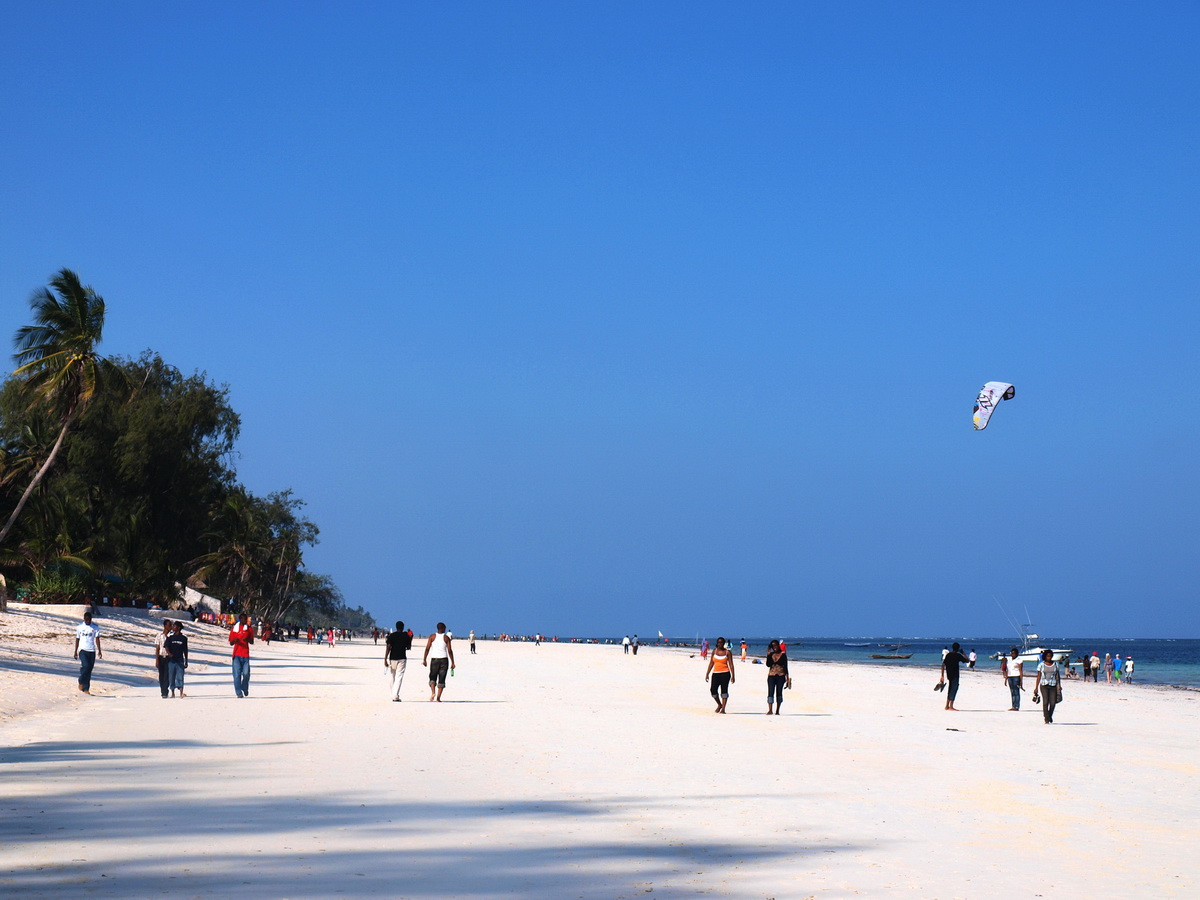 Diani Beach, Kenya